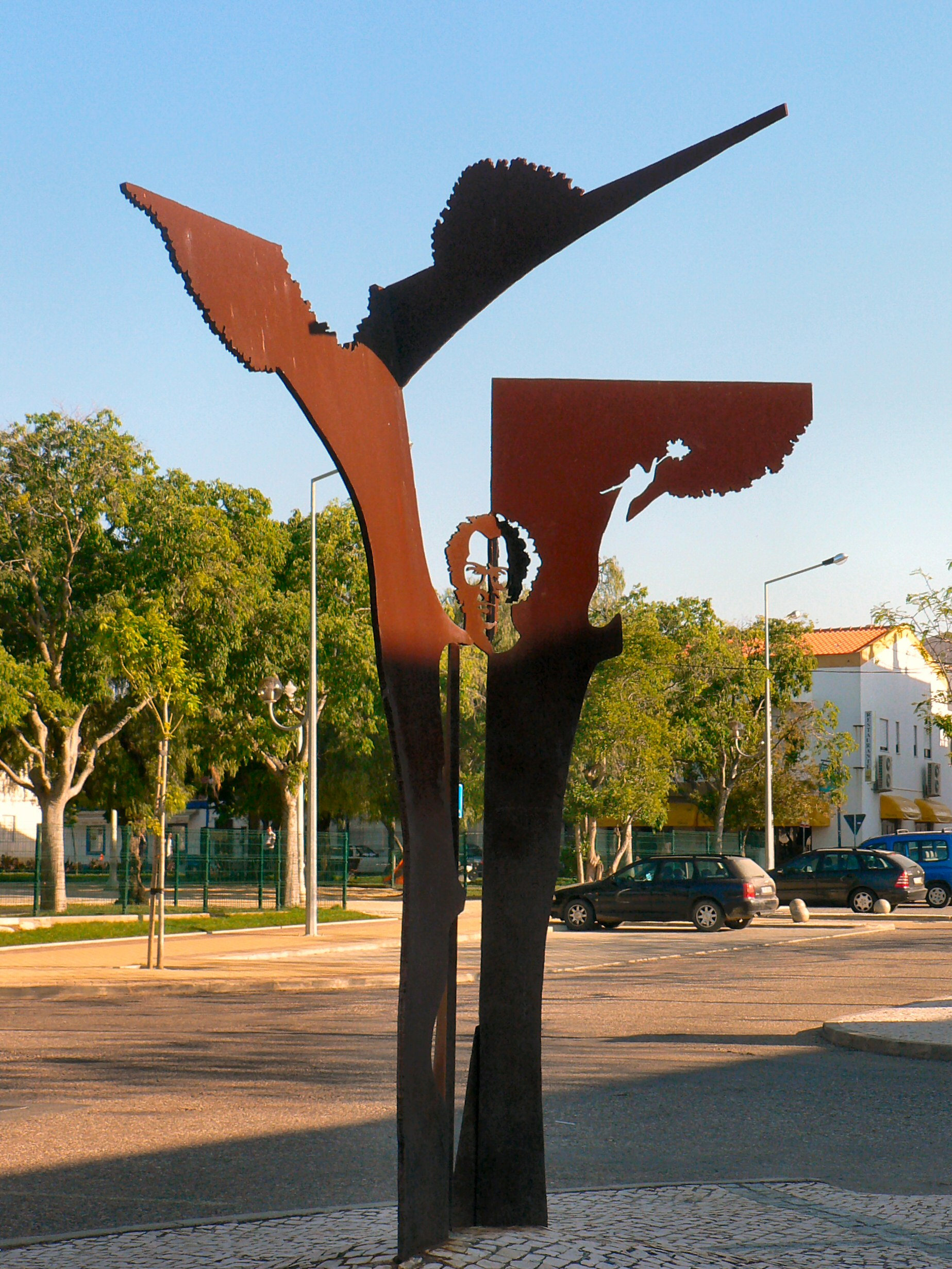 Monumento a José Afonso em Grândola